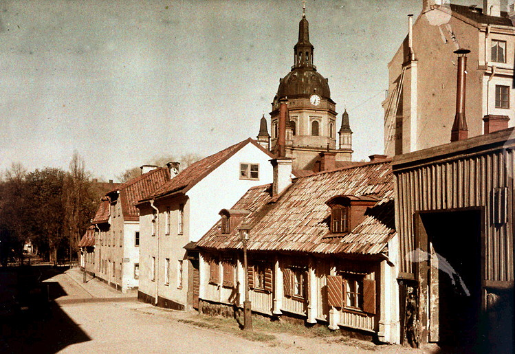 Före detta Stigbergsgatans västra del, numera Sandbacksgatan